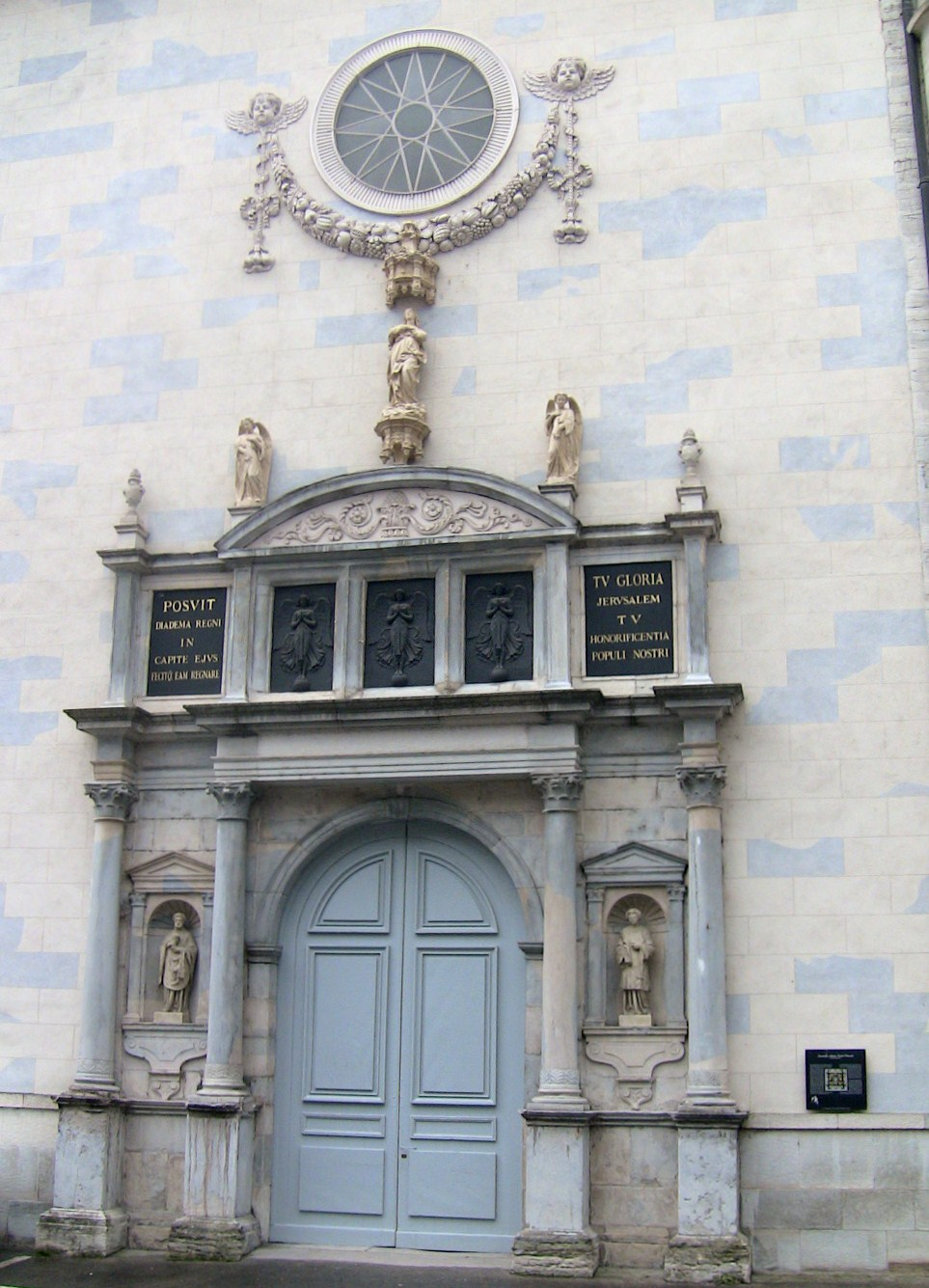 La façade de l'église Notre-Dame de Besançon (Doubs, France).